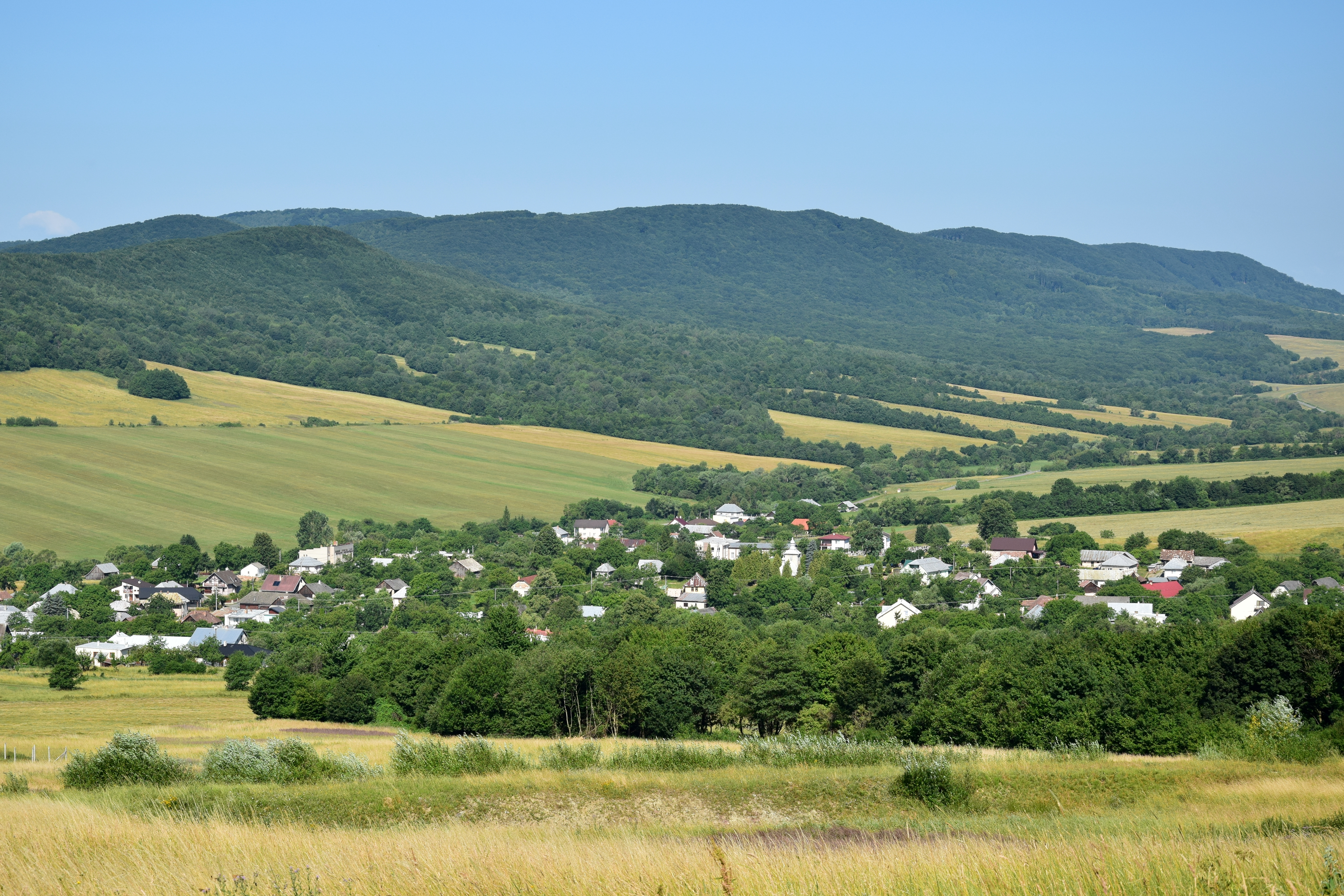 Kurimka – celkový pohled na vesnici z jihozápadního úbočí Makovice, v pozadí je hřeben Kohútova v Ondavské vrchovině